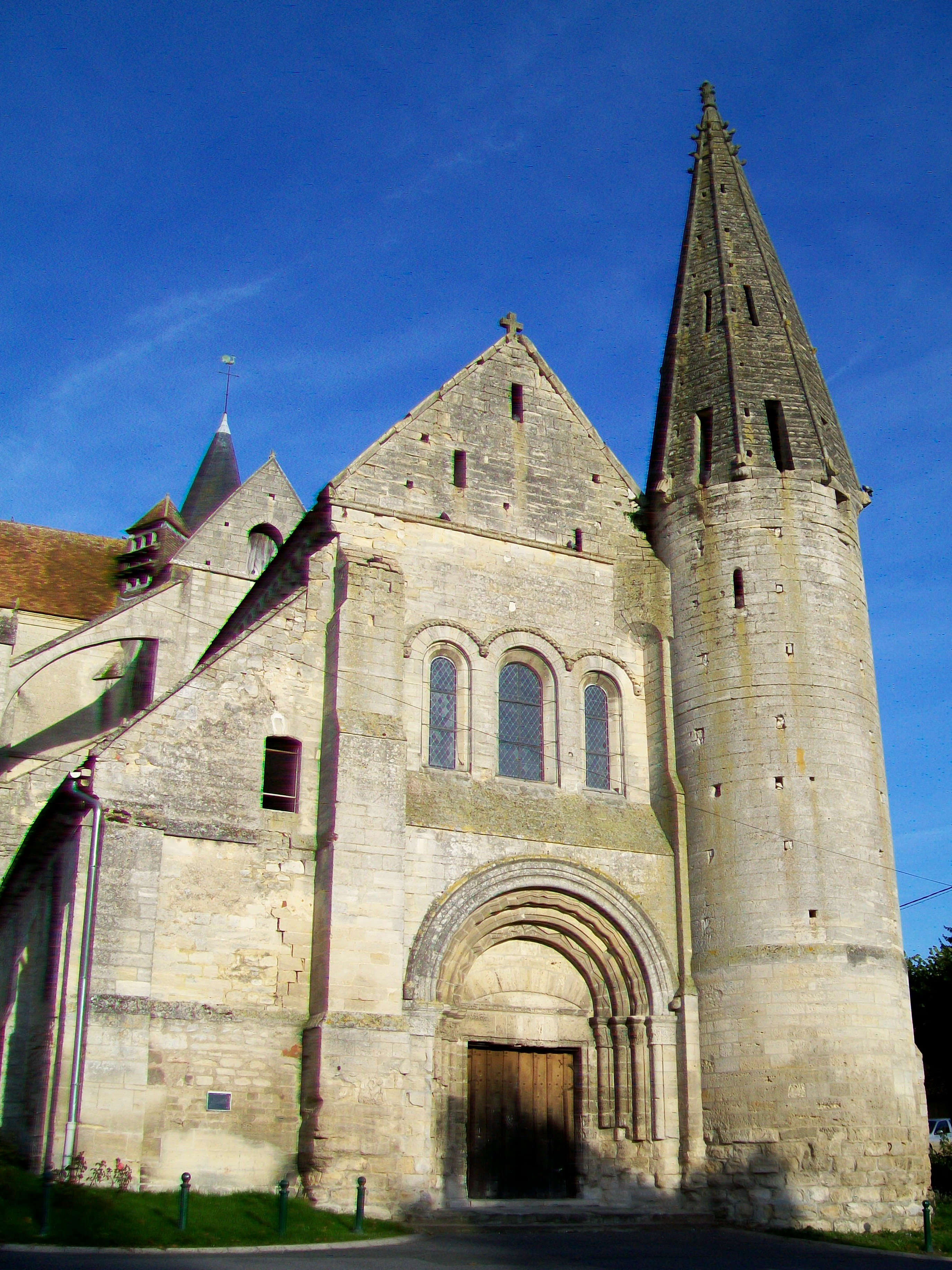 Façade sud-ouest de la nef romane et clocher rond.